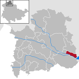 Gemeinde Görsbach in Thüringen, Landkreis Nordhausen